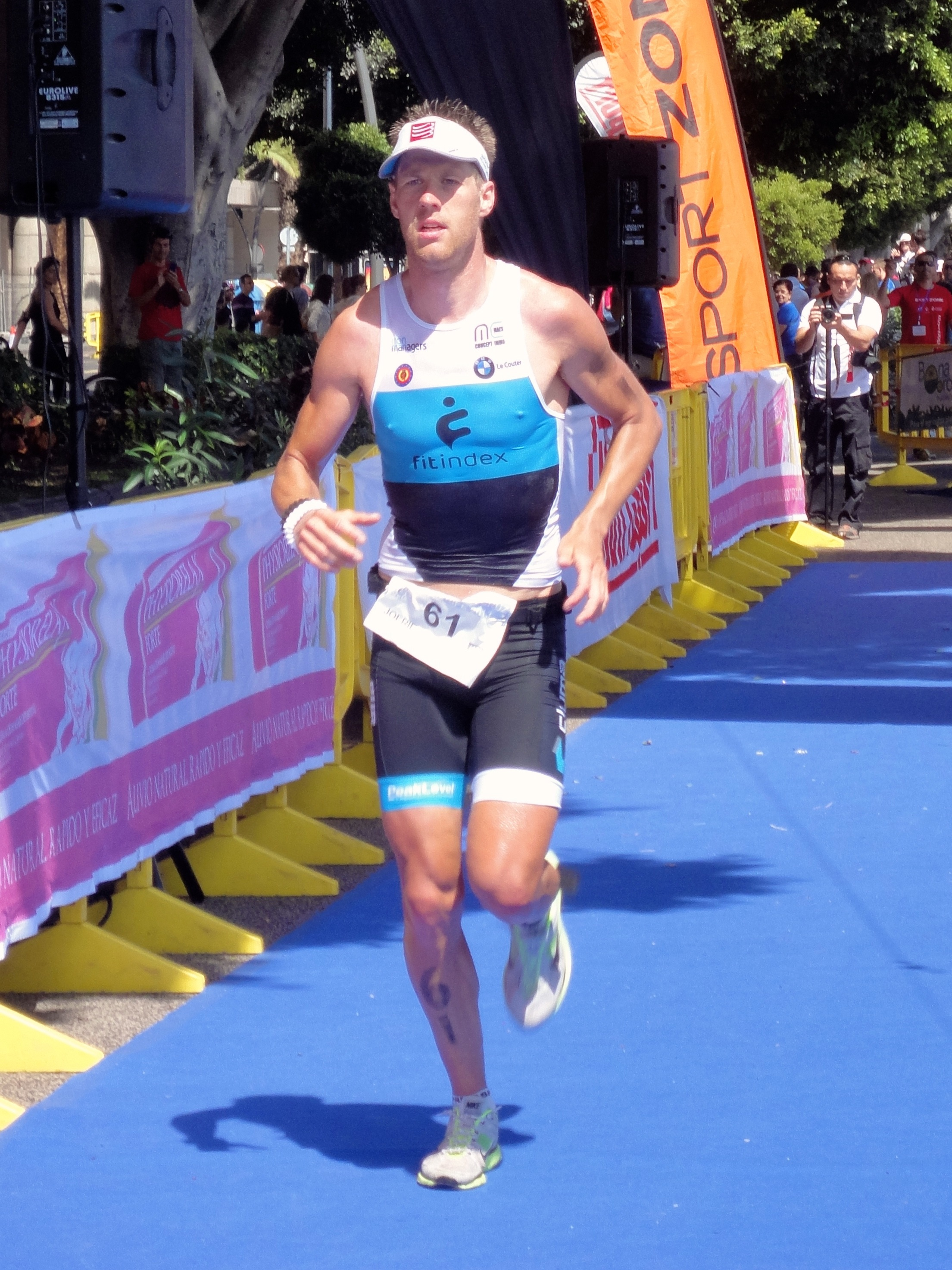 Belgisch duatleet